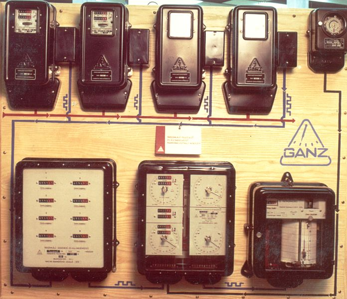 A Ganz Árammérőgyár termékei a Budapesti Nemzetközi Vásáron.